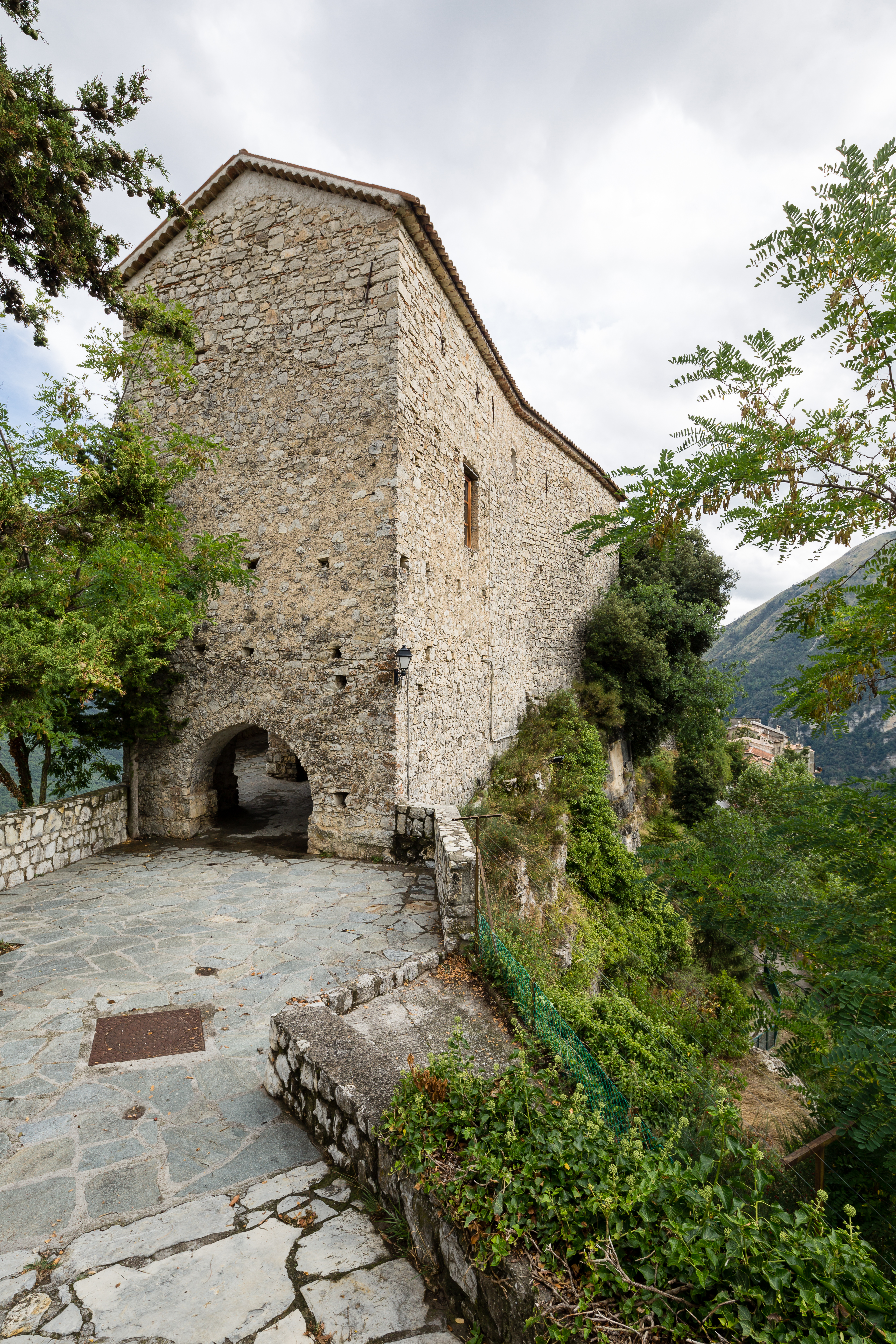 Chevet de l'église Sainte-Marguerite de Bairols (France).